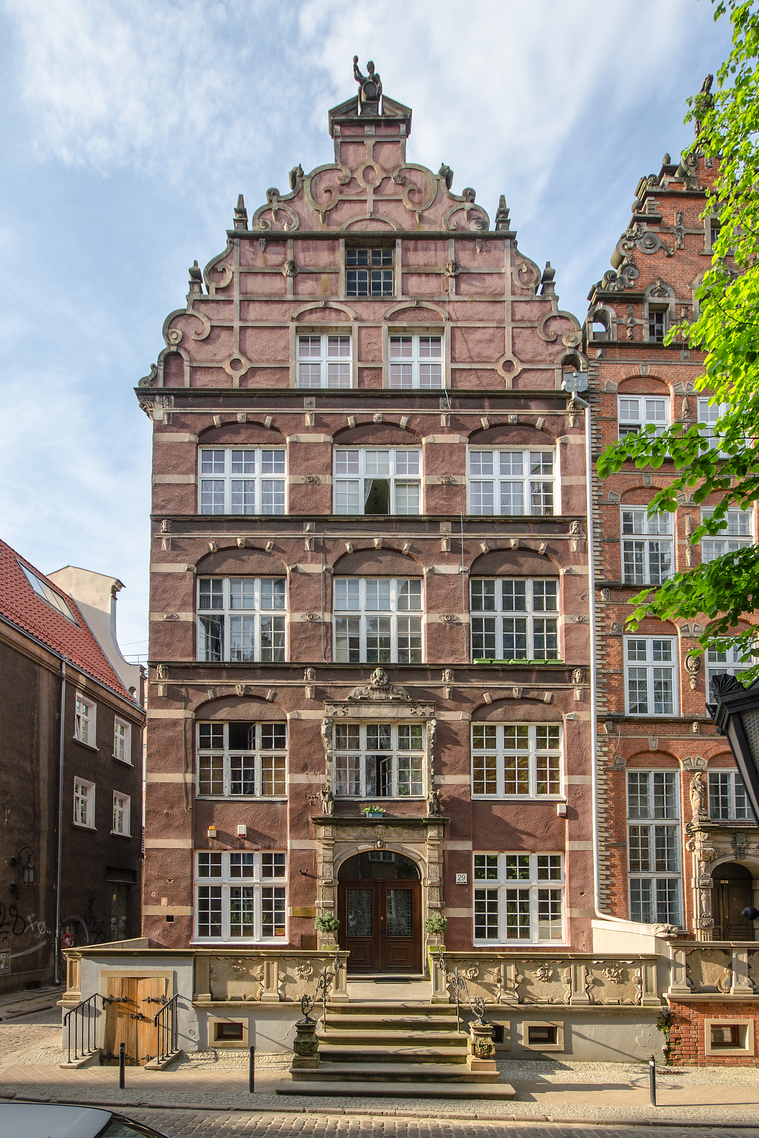 Gdańsk, dom, 1609